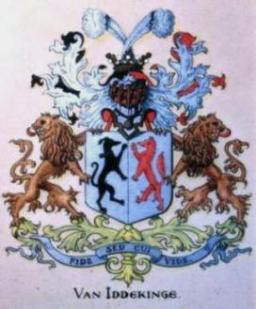 familiwapen Van Iddekinge